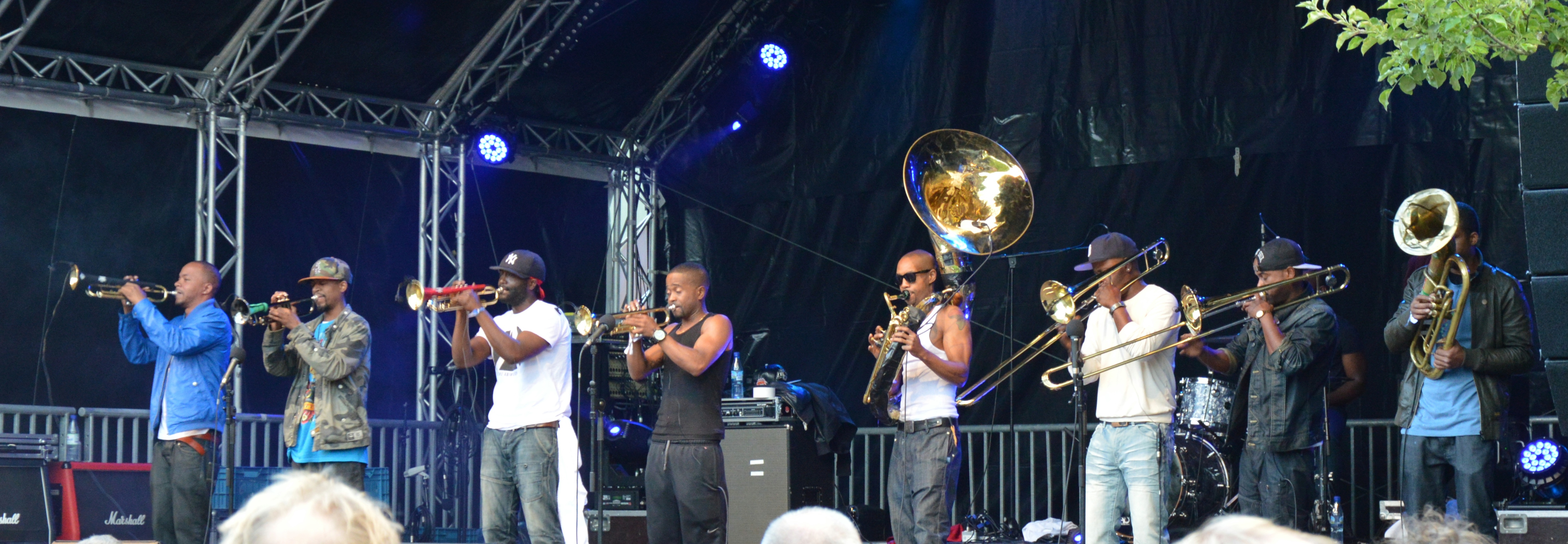 Hypnotic Brass Ensemble beim Traumzeit-Festival 2013